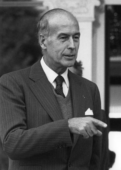 recadrage de « B 145 Bild-F056912-0010, Bonn, Bundespräsident mit Giscard d'Estaing.jpg », cliché du 1er octobre 1979.